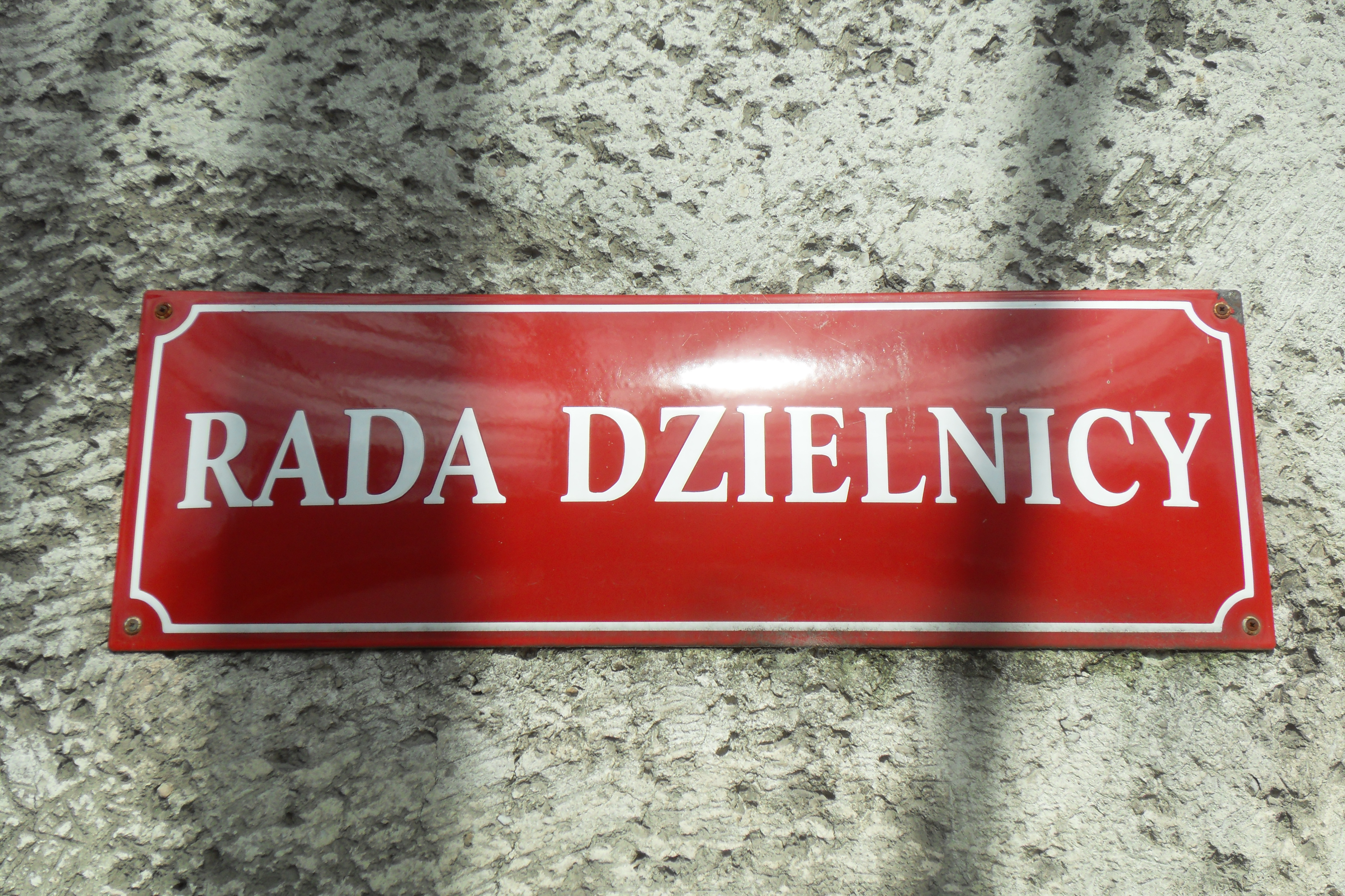 Gdańsk Przymorze Małe, ul. Czerwony Dwór 25. Siedziba Rady Dzielnicy Przymorze Małe.